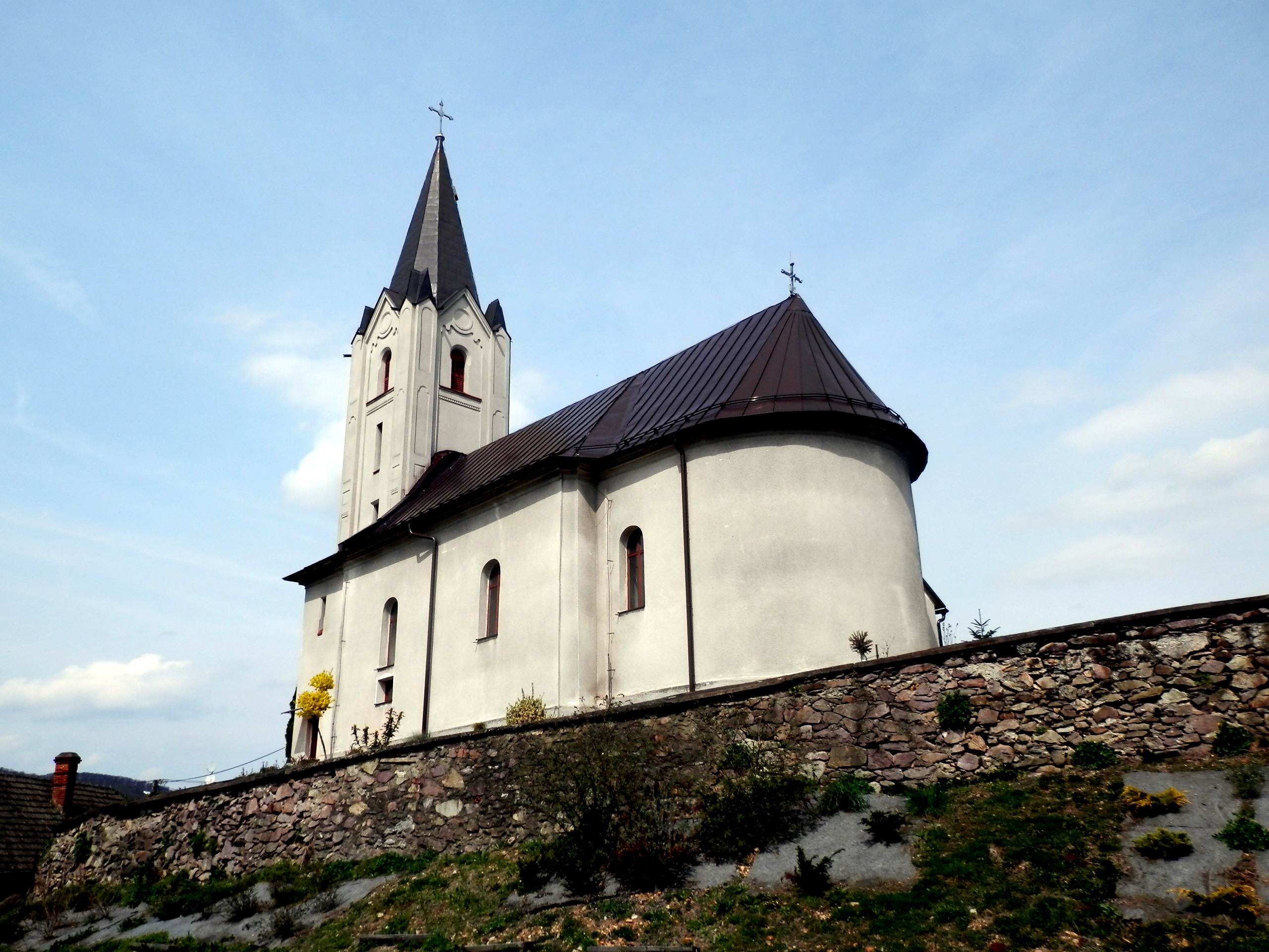 Evanjelický kostol, obec Obišovce, okres Košice okolie.